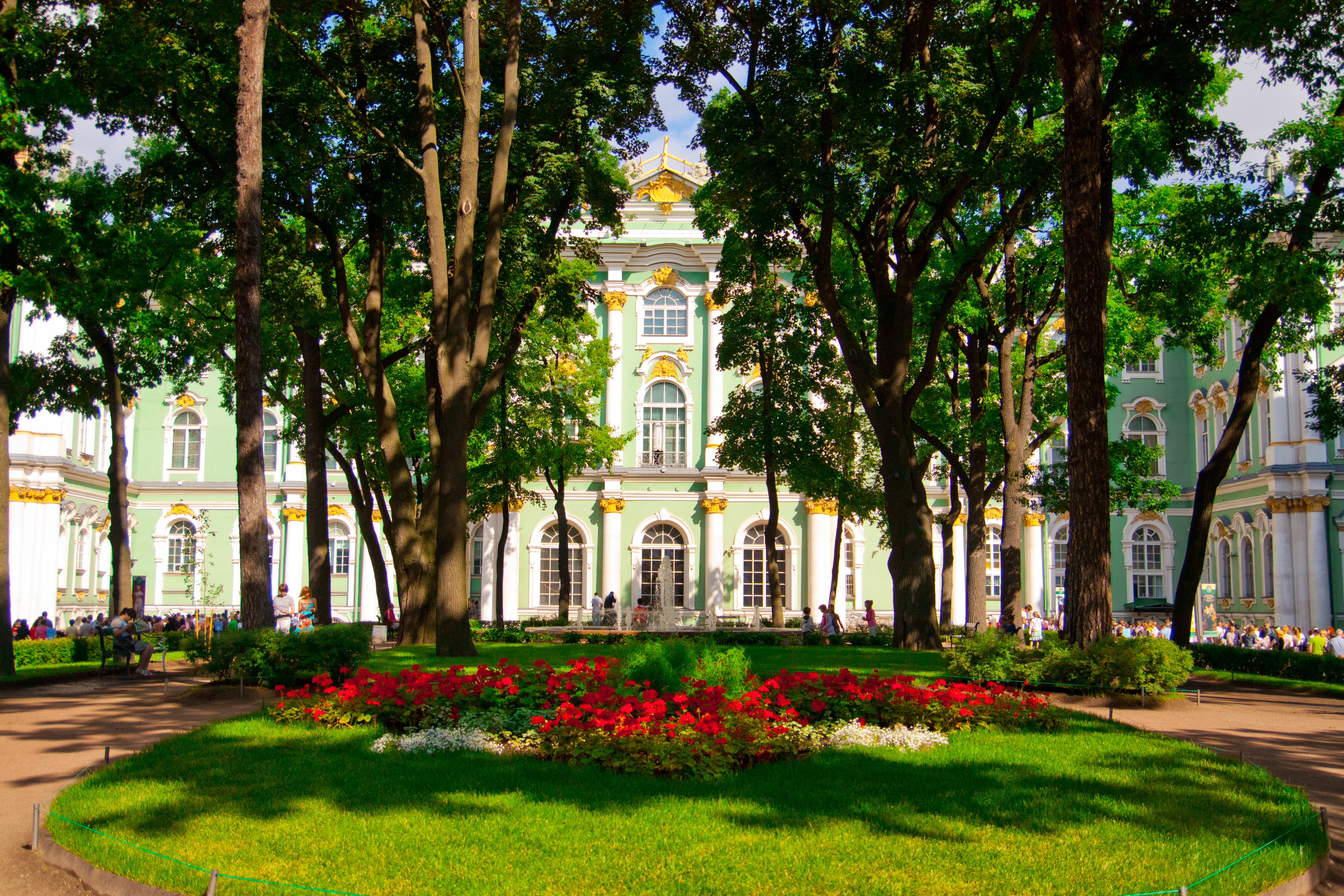 Внутренний двор Зимнего Дворца, фотография со стороны входа